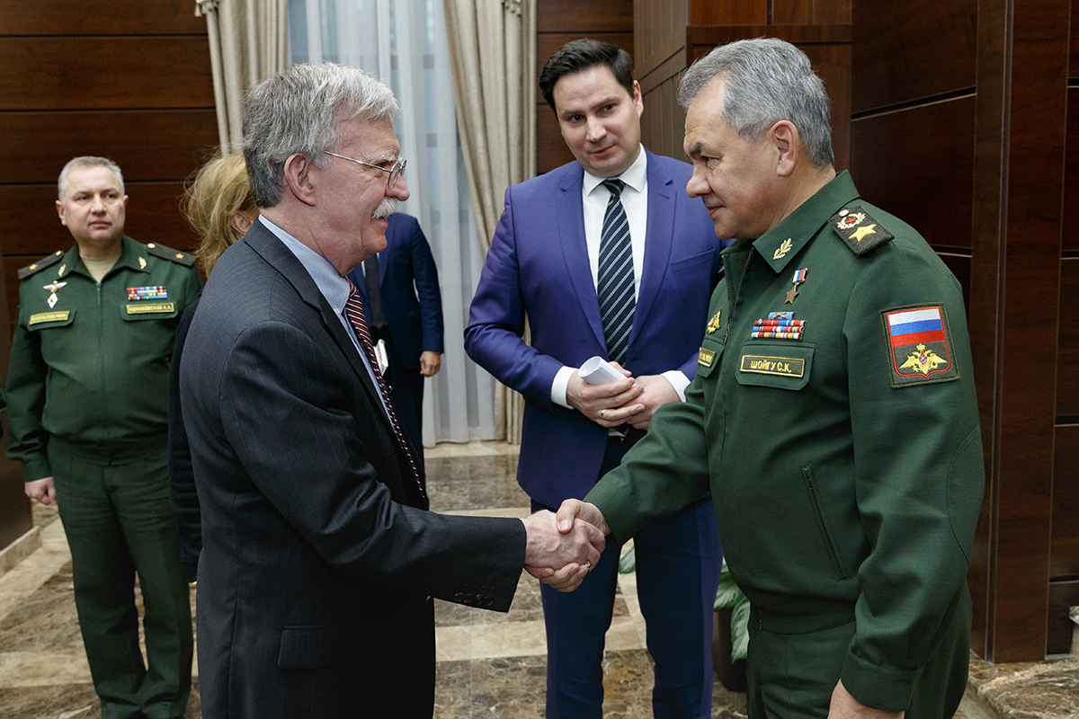 Переговоры министра обороны России генерала армии Сергея Шойгу и советника президента США по национальной безопасности Джона Болтона.